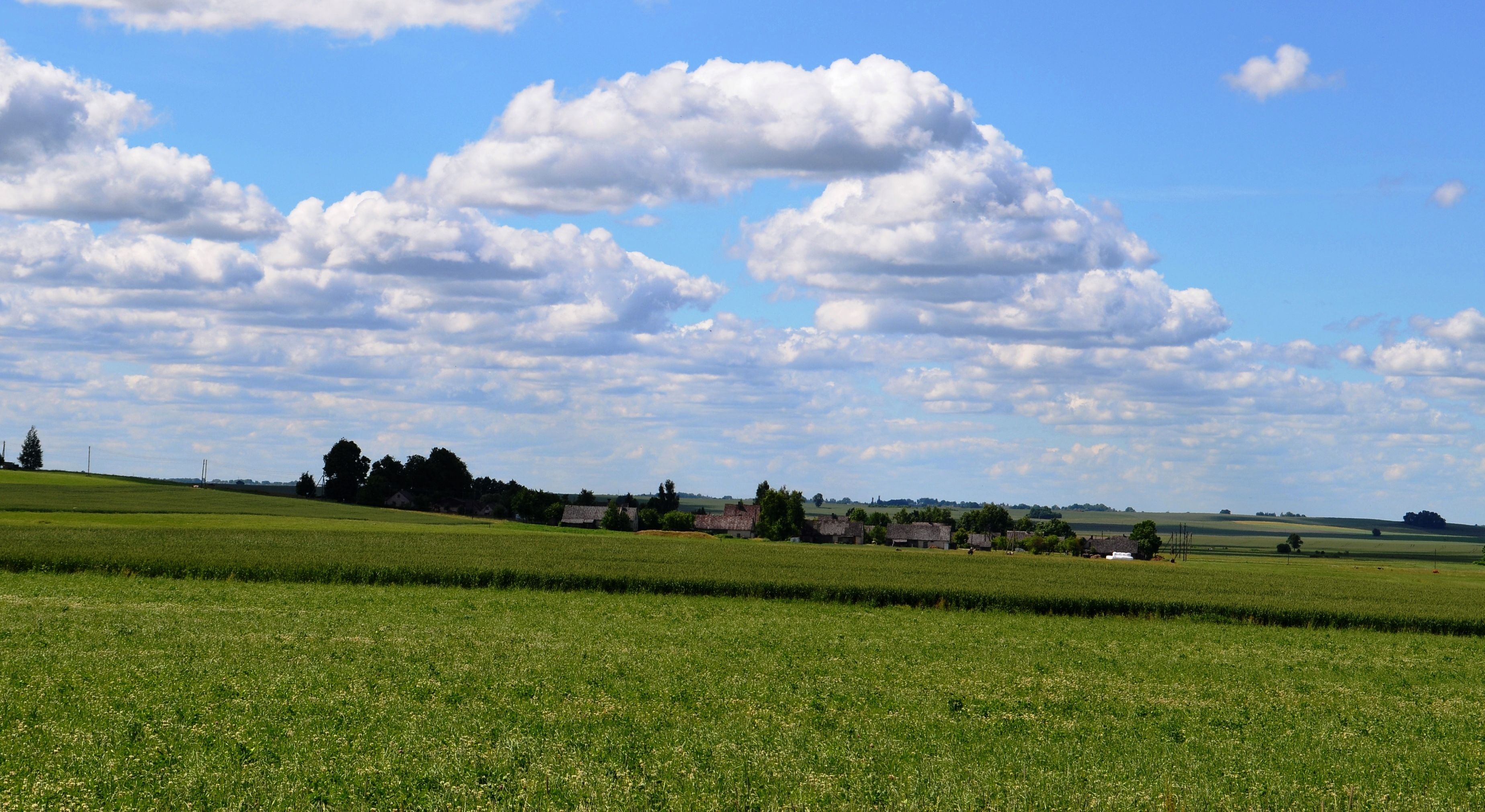 Aukštdvaris, Kėdainių raj.